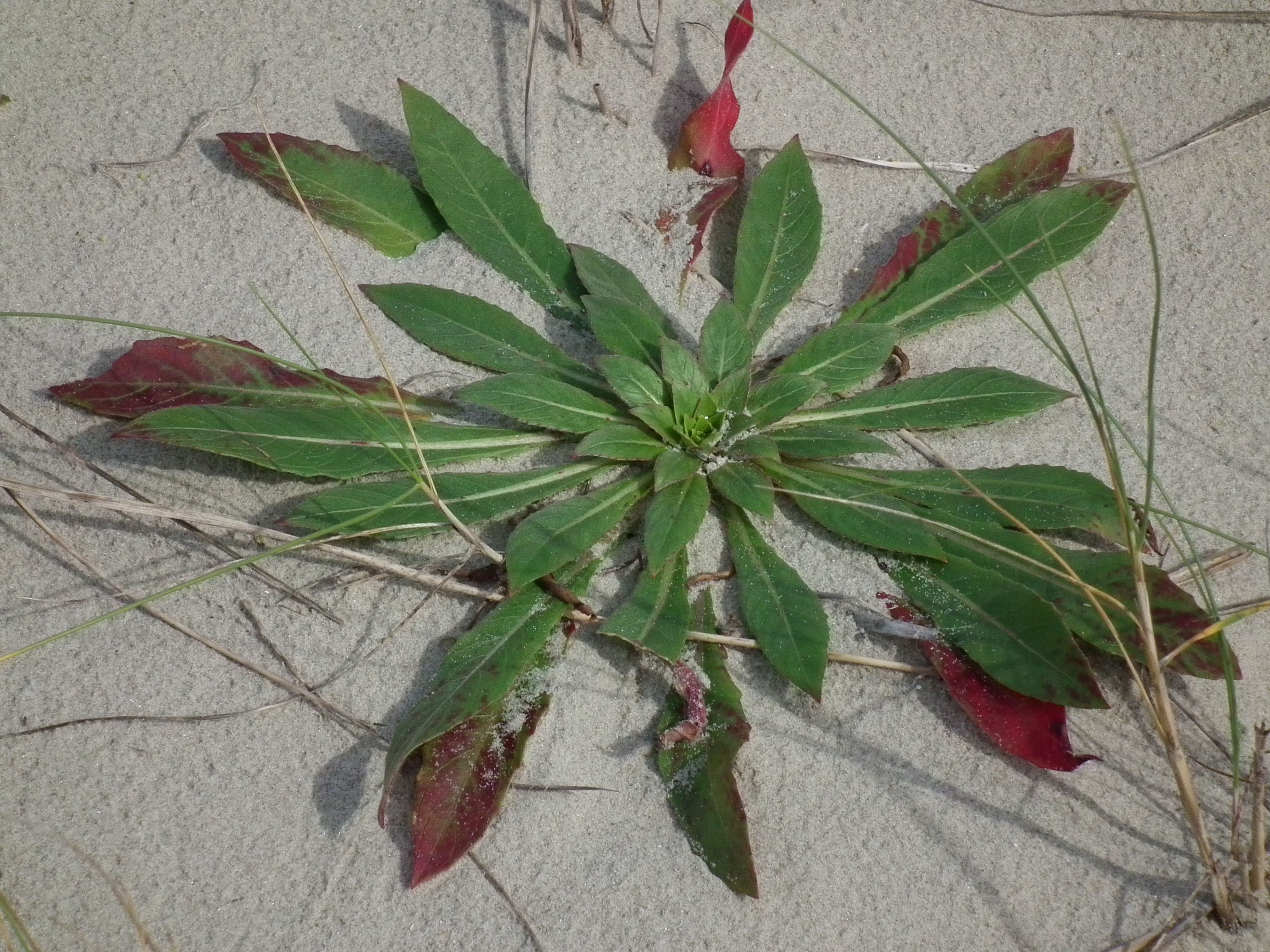 Pflanze aus der Familie der Nachtkerzen (Oenothera) in den Dünen auf der ostfriesischen Nordseeinsel Juist (Niedersachsen, Deutschland)